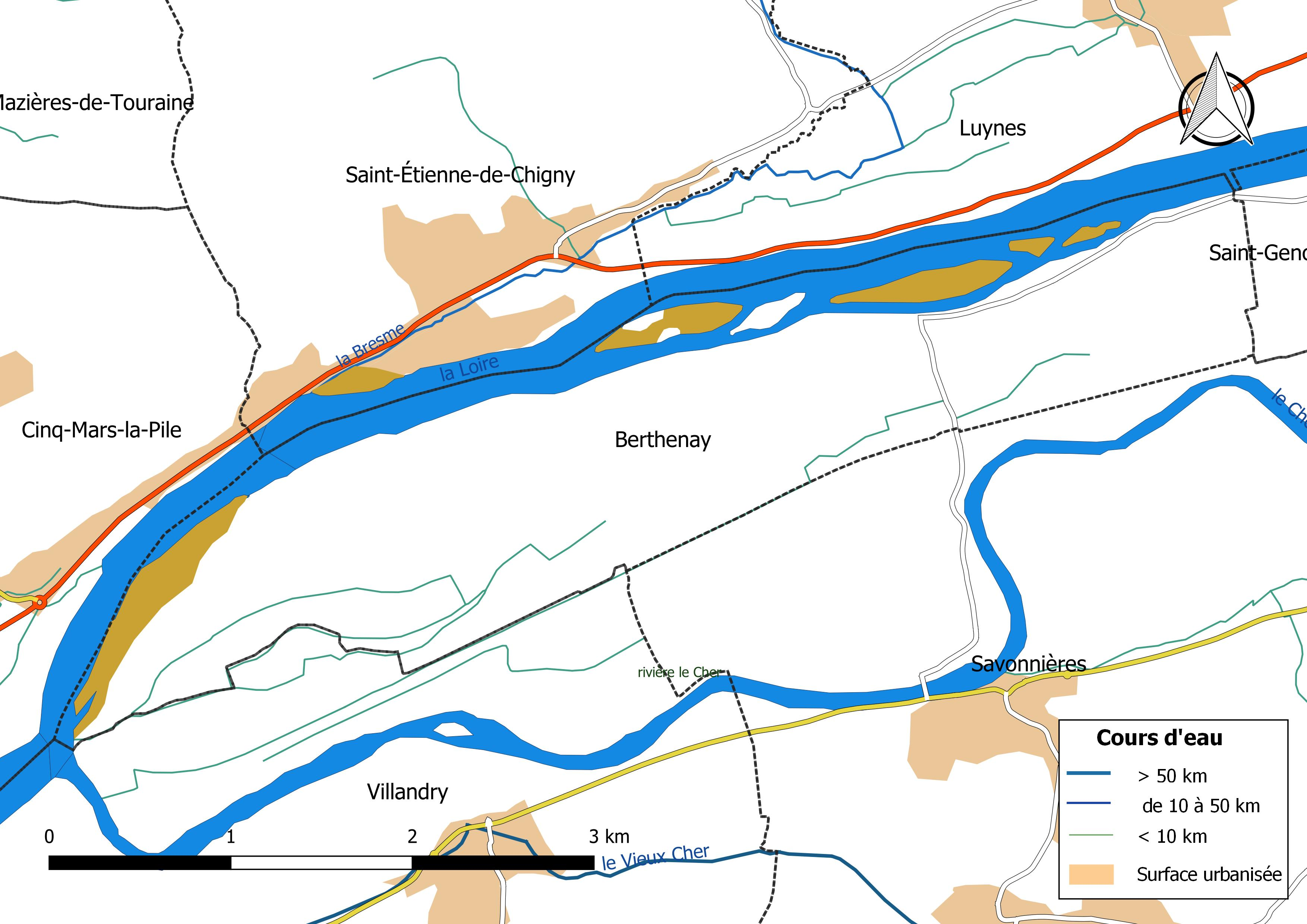 Carte du réseau hydrographique de la commune de Berthenay (France).